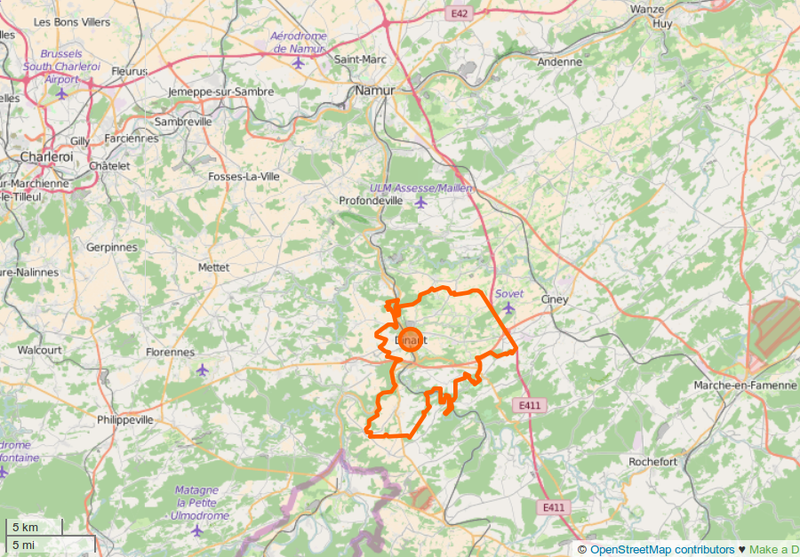 Situation de Dinant, Belgique, OSM. This map may be incomplete, and may contain errors. Don't rely solely on it for navigation.